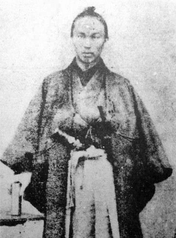 a Japanese man 岩村高俊 (Takatoshi iwamura)